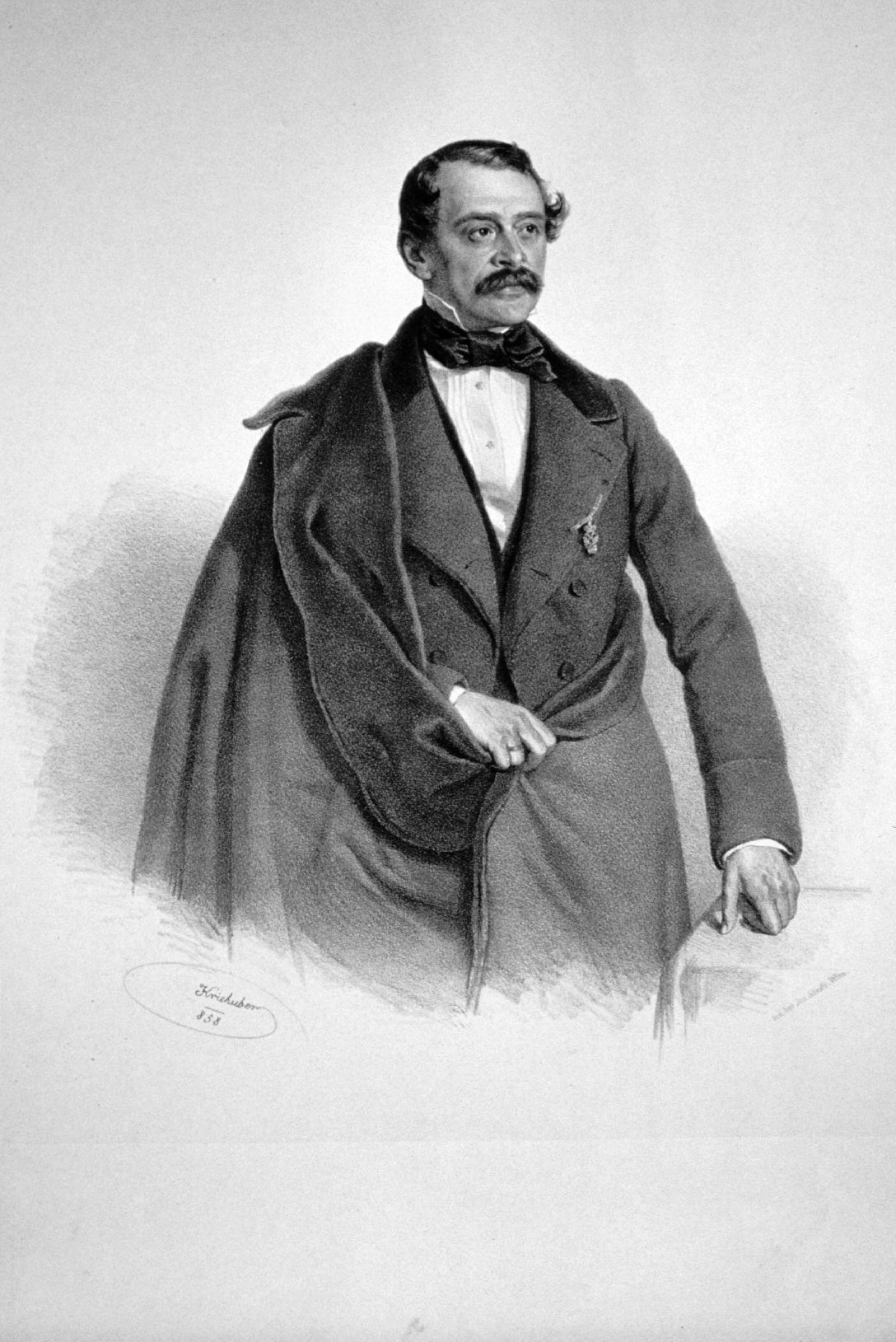 Carl Graf von Rothkirch und Panthen (1807-1870), k. k. Beamter, zuletzt Statthalter von Böhmen. Lithographie von Josef Kriehuber, 1858